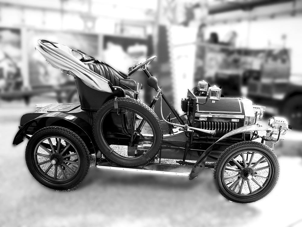 Die letzte noch erhaltene Puch Voiturette von 1906